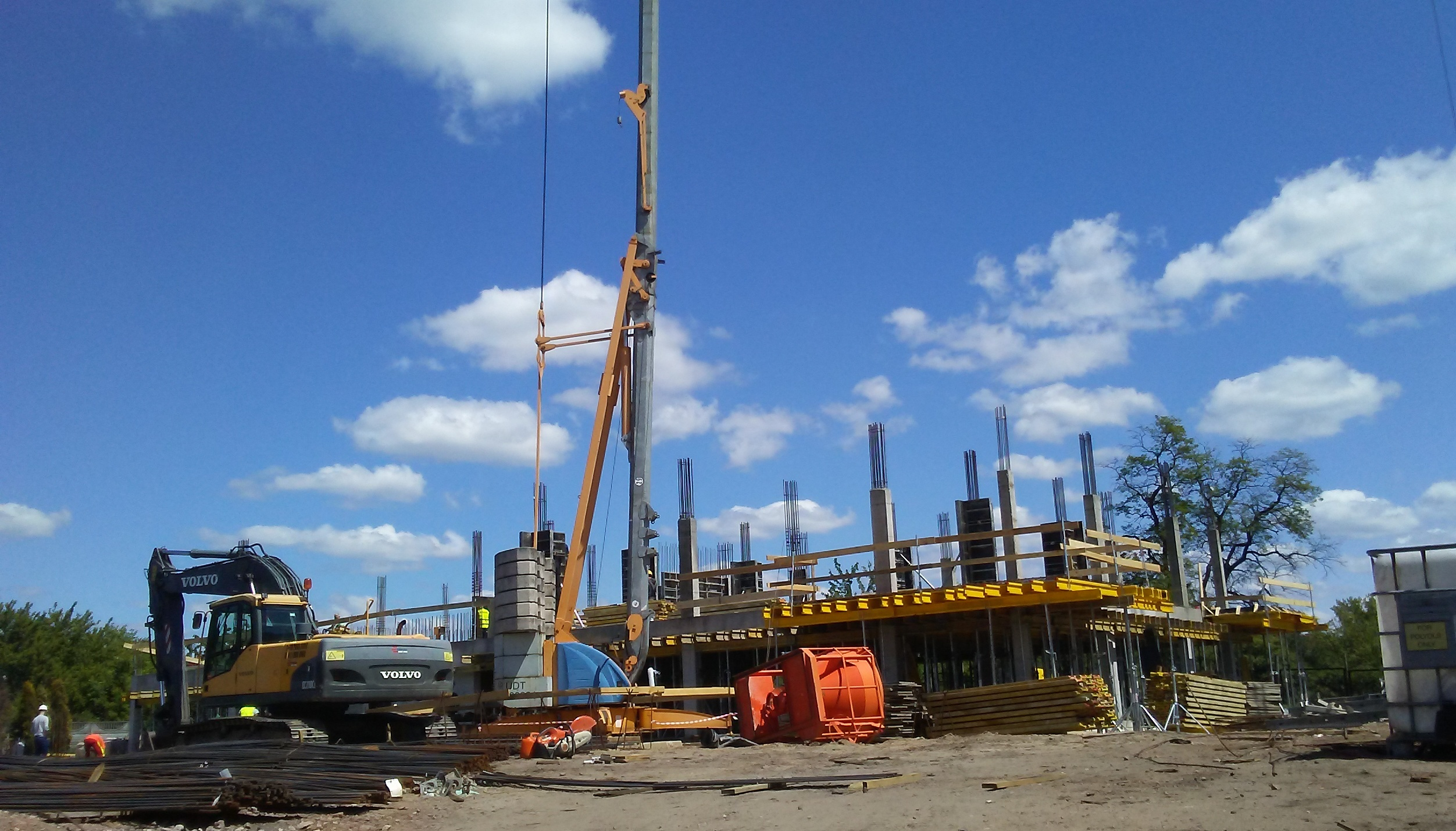 Koparka Volvo na budowie przy ulicy Długiej w Tomaszowie Mazowieckim